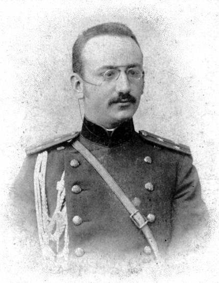 Беля́ев Ива́н Тимофе́евич (исп. Juan Belaieff; 19 апреля 1875, Санкт-Петербург — 19 января 1957, Асунсьон: Чин/звание: «Генерал-майор» Знаки различия на картине: погоны и звёзды «Поручик».